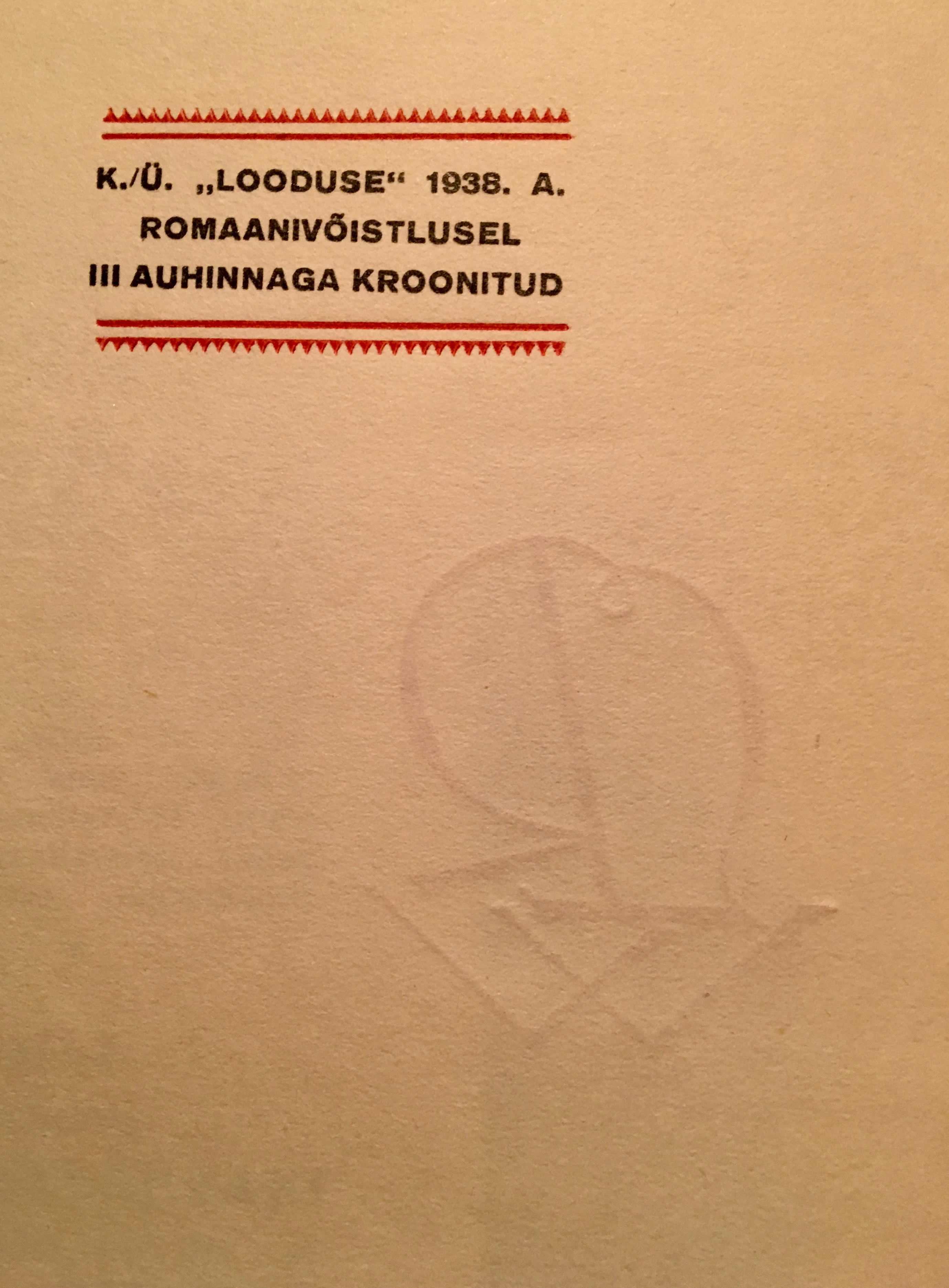 Auhinnamärge